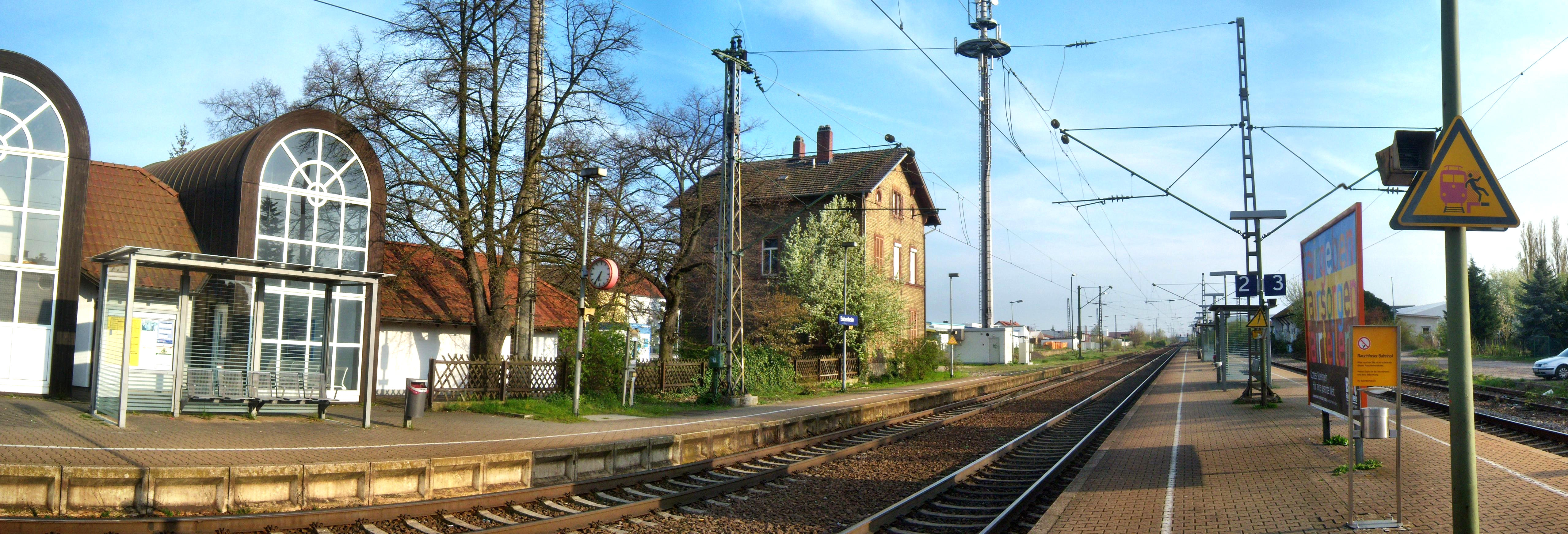 Der Bobenheim-Roxheimer Bahnhof in Rheinhessen (Deutschland)